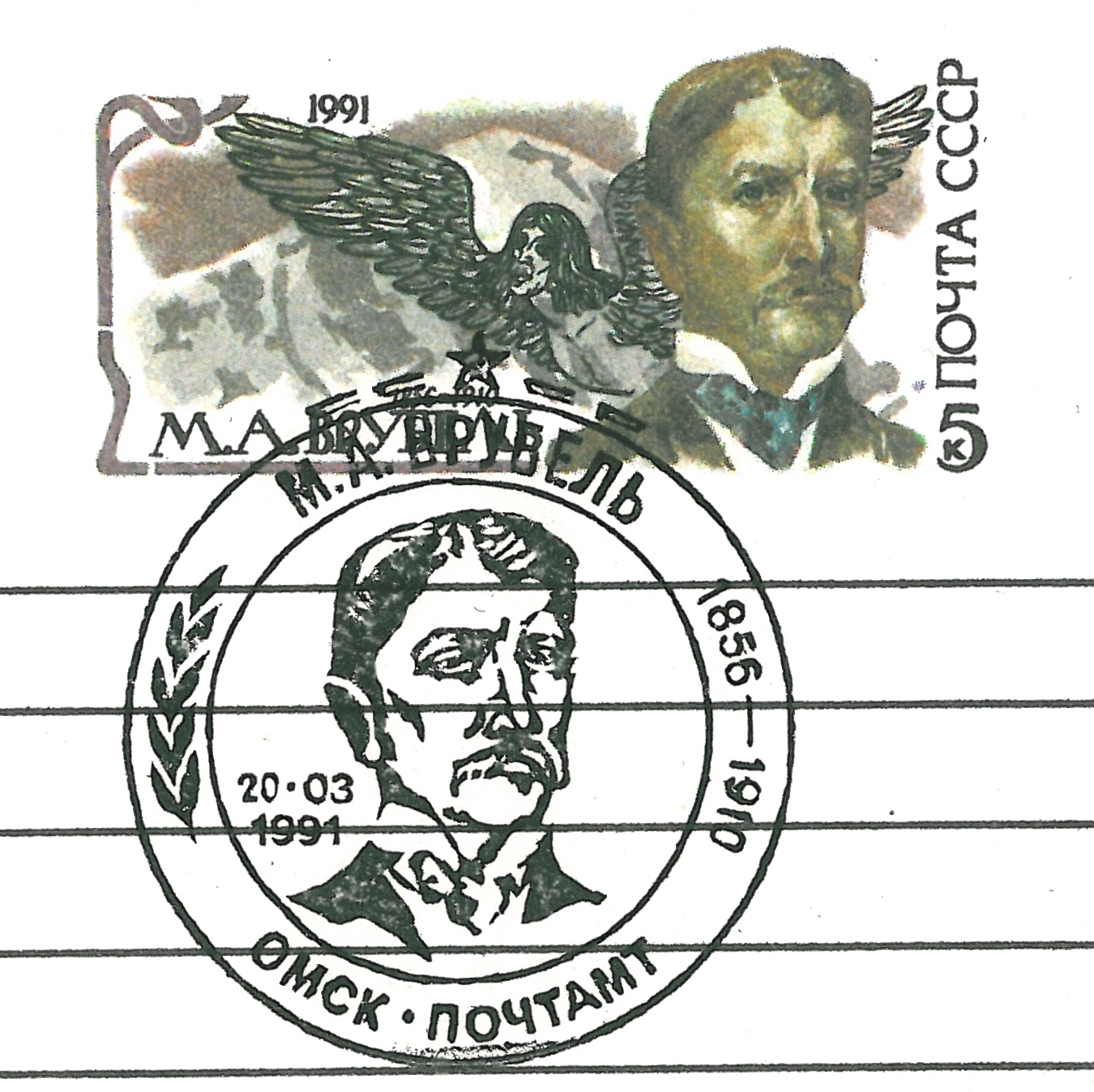 Vrubel, USSR original stamp, 1991 Михаил Врубель (1856-1910). 135 лет со дня рождения . Оригинальная почтовая марка номиналом 5 копеек с маркированного почтового конверта СССР. На марке портрет Врубеля и "демон". 1991 год. Дата подписания в печать - ... 1990. Гашение специальное - 20 марта 1991 года, Омск, Главпочтамт.